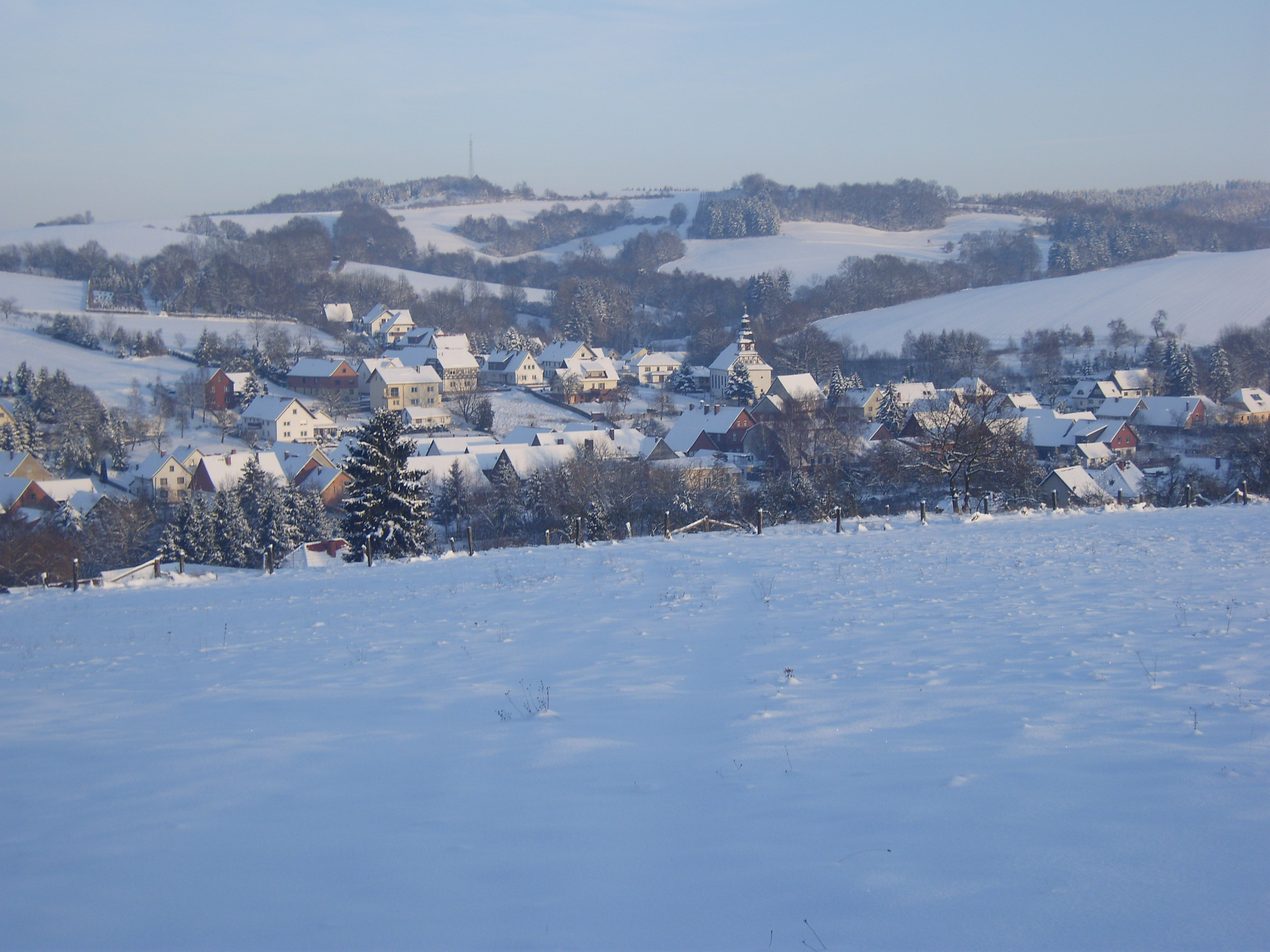 Zwinge